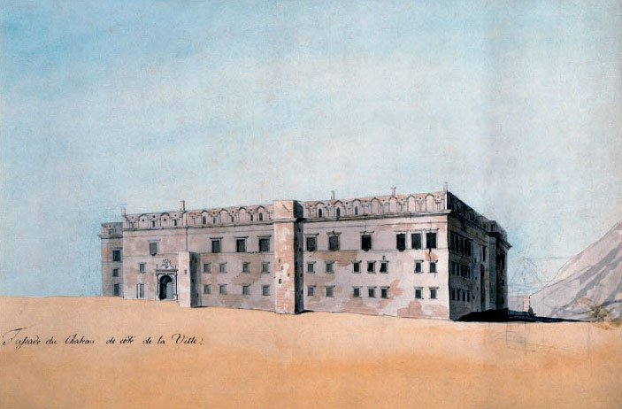 Беларуская (тарашкевіца): Палац вялікіх князёў літоўскіх у Вільні